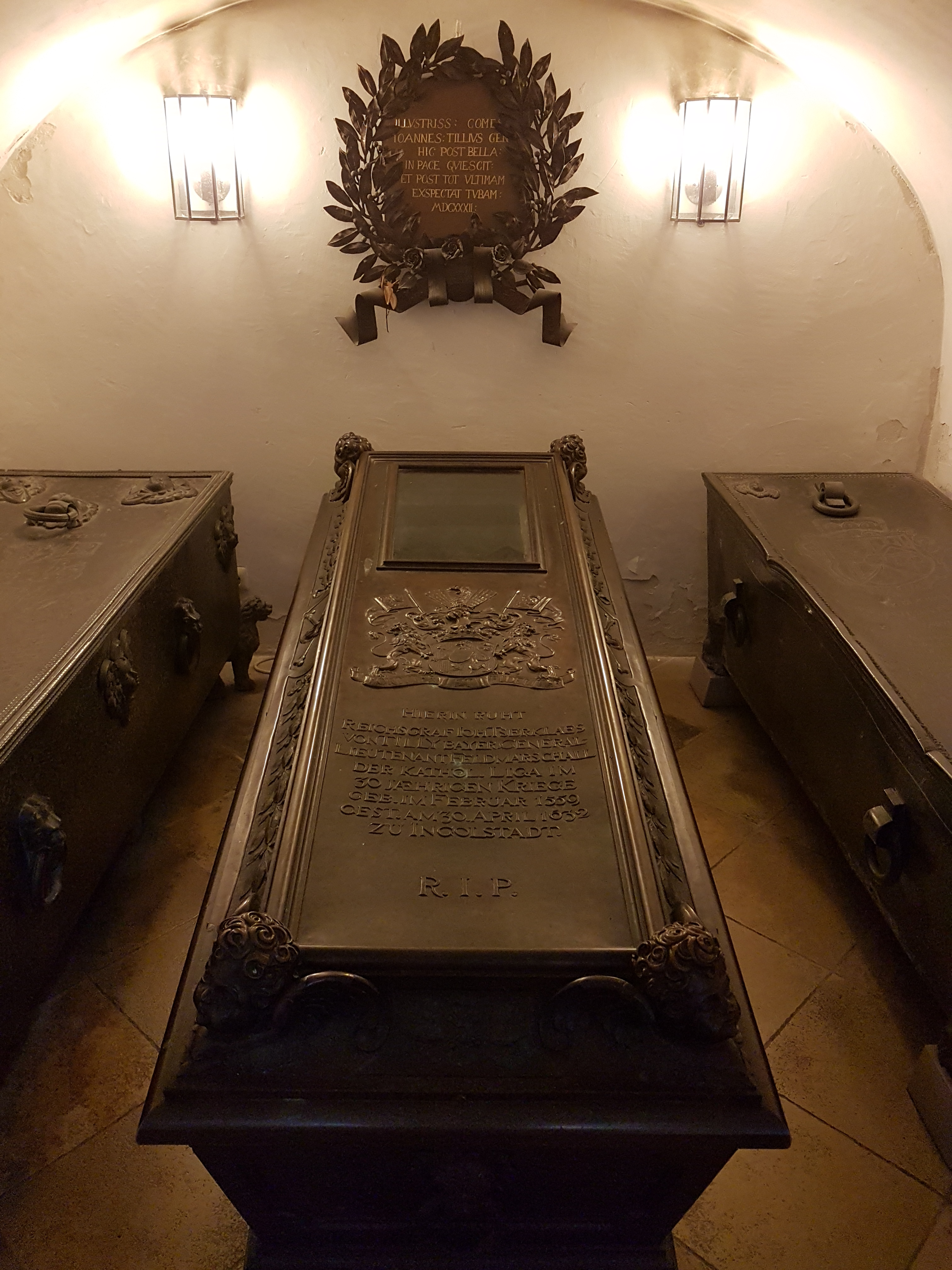 Augustiner-Chorherrenstift Altötting, Tilly-Gruft.